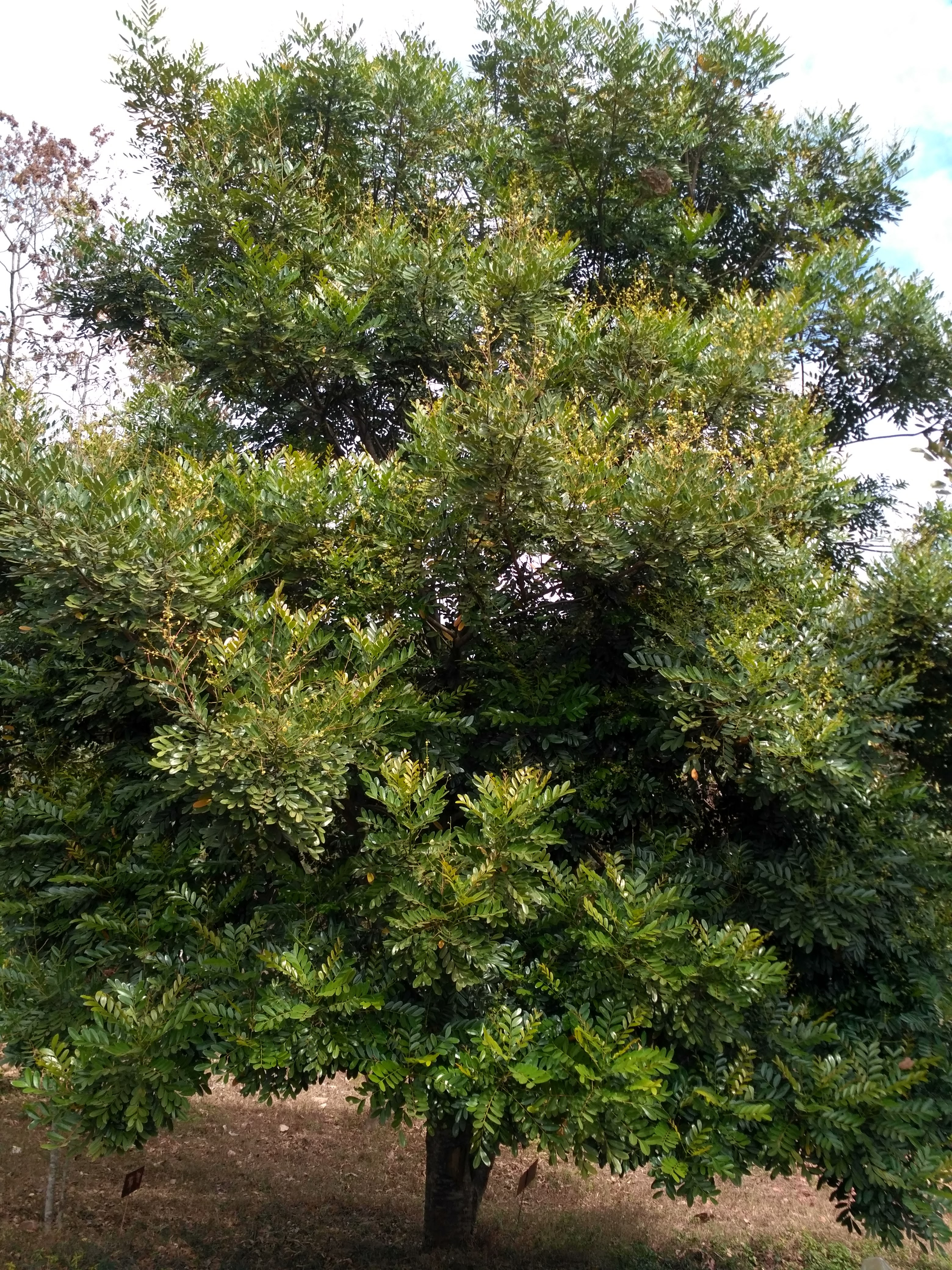 medicinal plamt